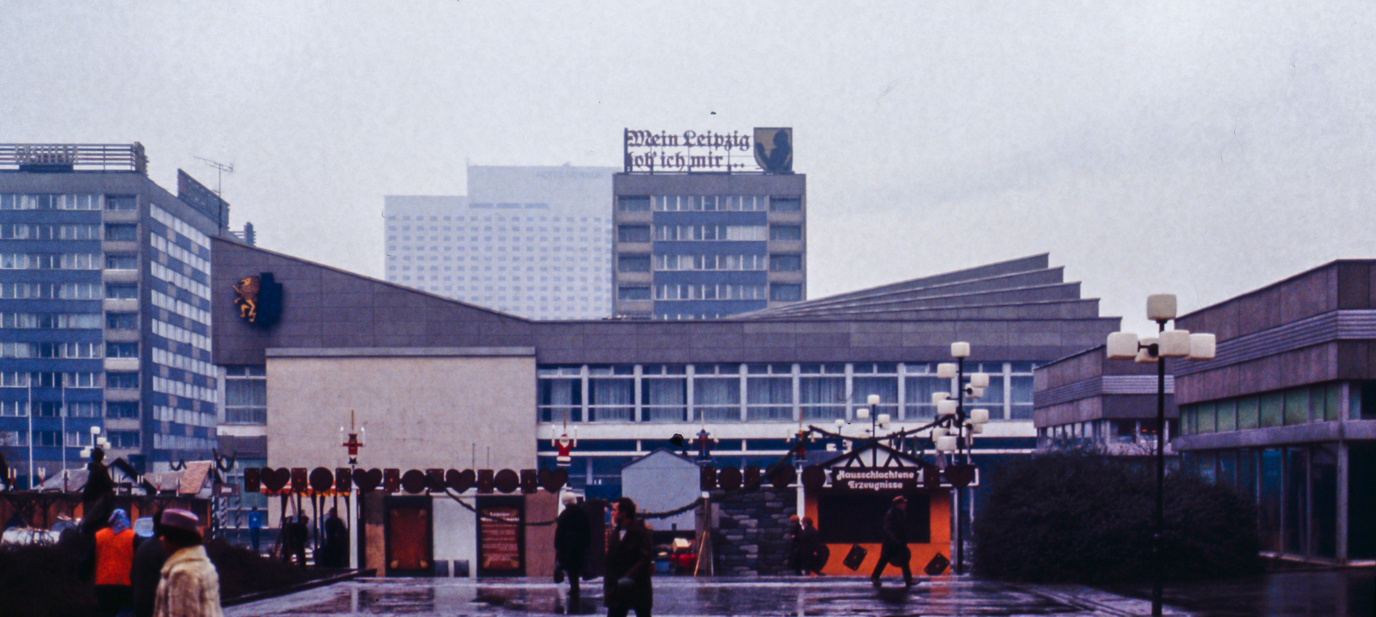 Sachsenplatz in Leipzig